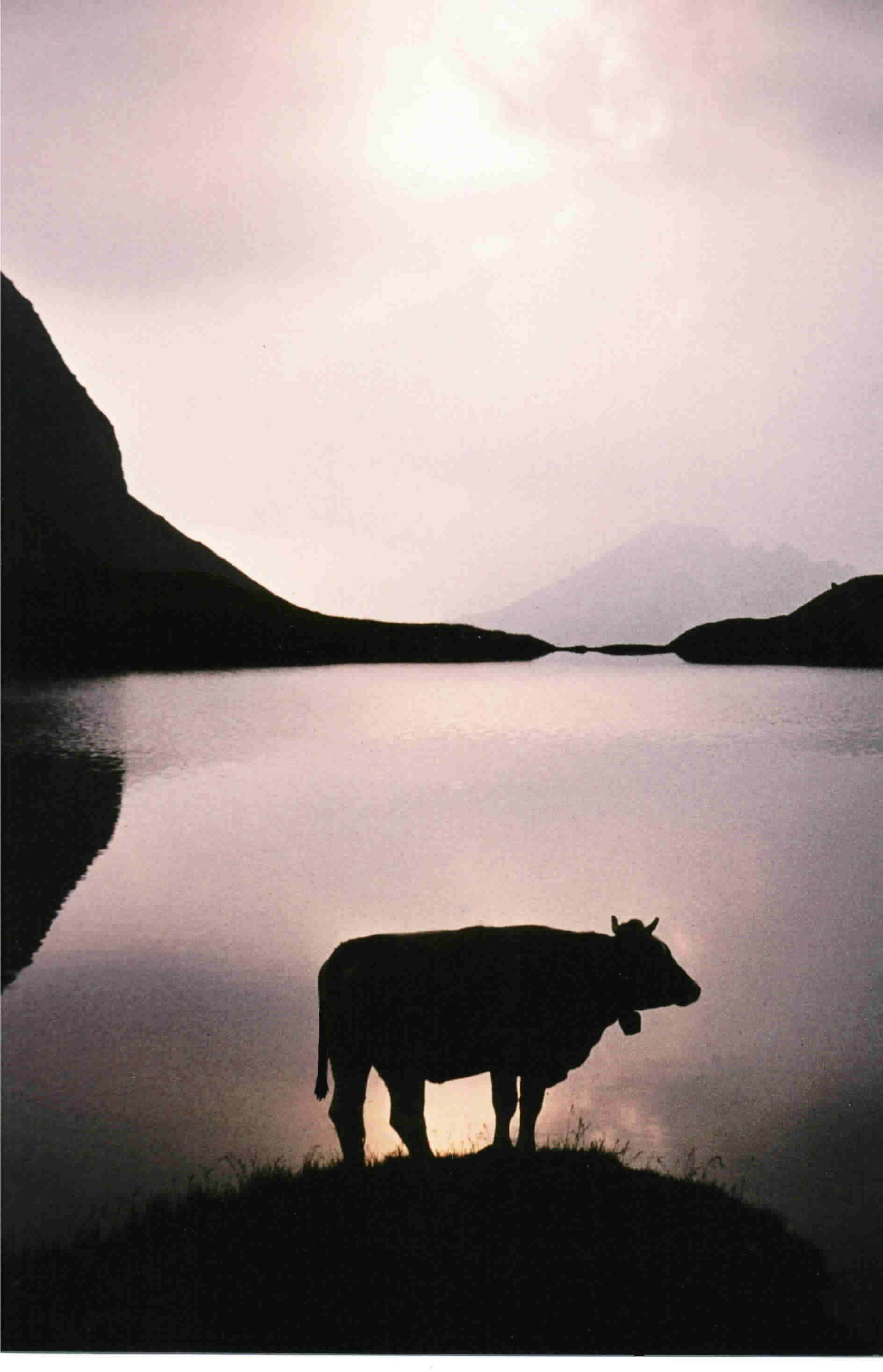 Kuh am Rappensee (Allgäu), 2047m in der Abendsonne. Die Kuh hatte ich erst einmal dorthin treiben müssen. Standort:47°17′10.9″N 10°15′12.7″E / 47.286361°N 10.253528°E